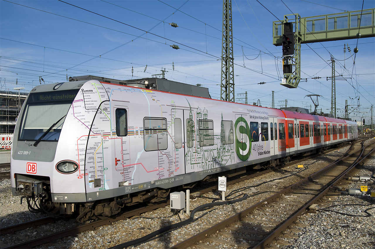 423 089-2 bzw. 423 589 in Sonderbeklebung für das Jubiläum "40 Jahre S-Bahn München" am 02.06.2012. Aufgenommen in München-Pasing.